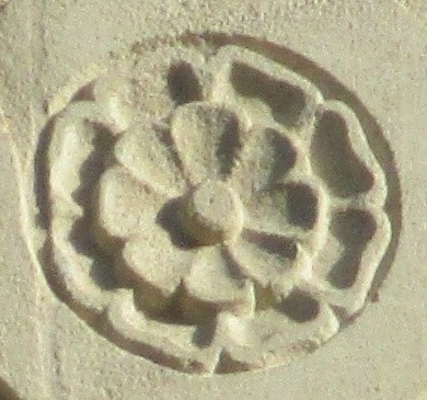 Rosenornament am alten Rathaus in Luxemburg Stadt am Krautmarkt (Palais Grand-ducal)